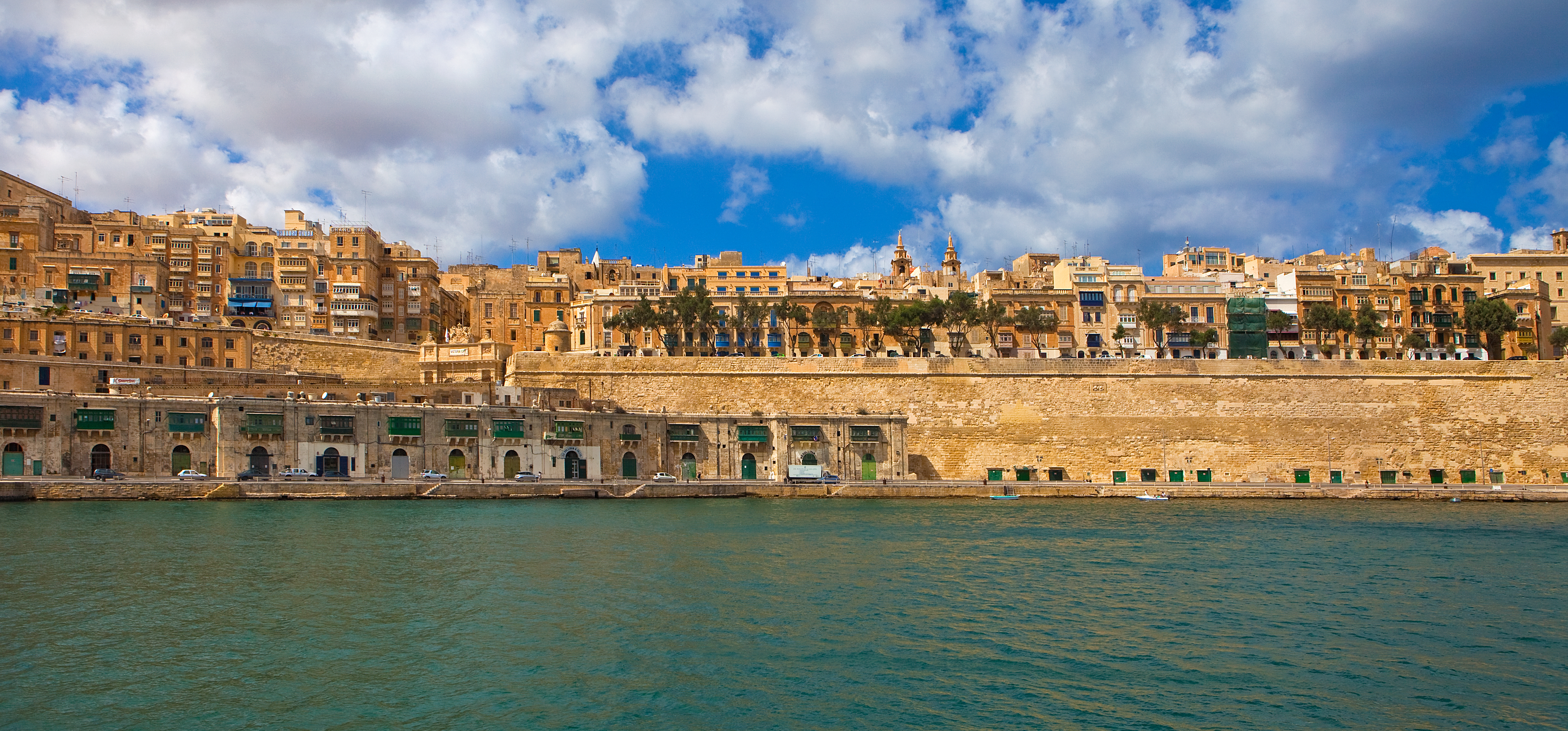 Malta 2010